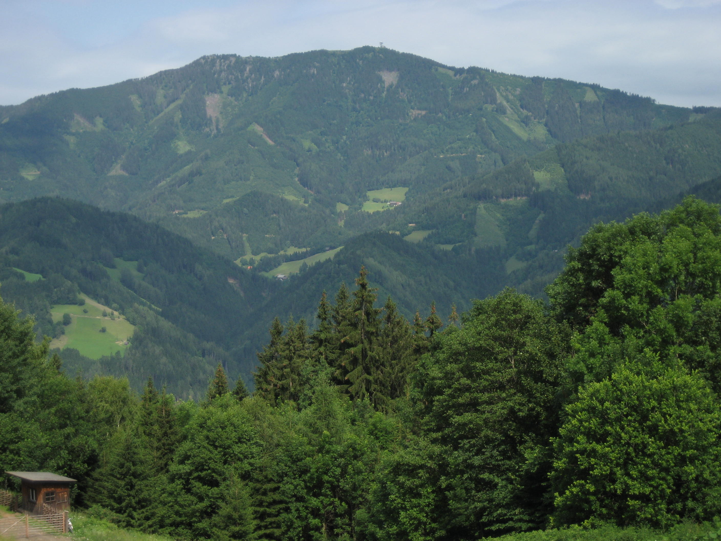 Rennfeld (Steiermark, Österreich), vom Hochlantsch gesehen / Mount Rennfeld in Styria, Austria